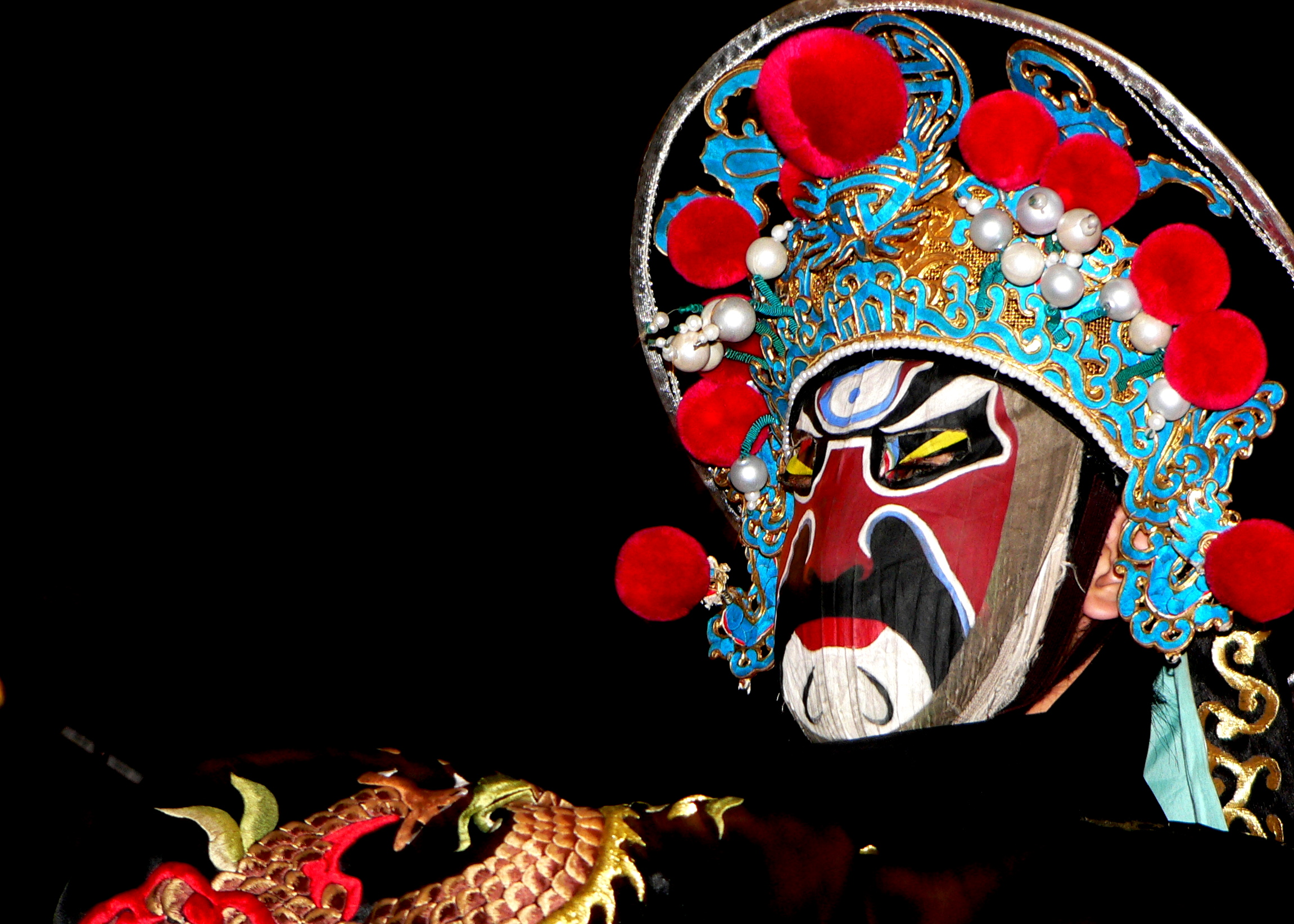 Bianlian/变脸